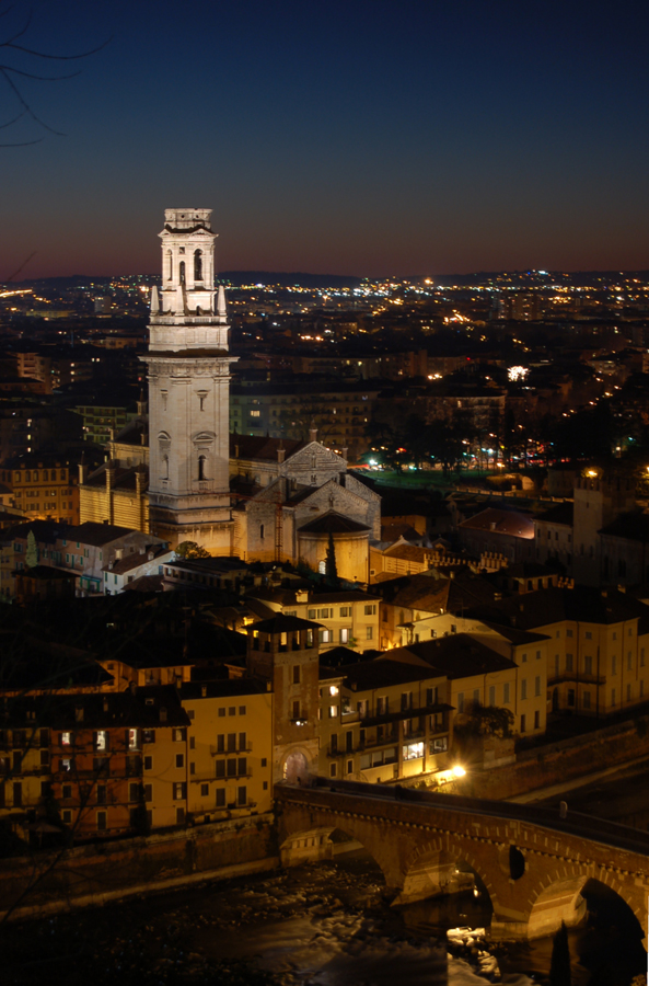 Il Duomo e il ponte Pietra a Verona